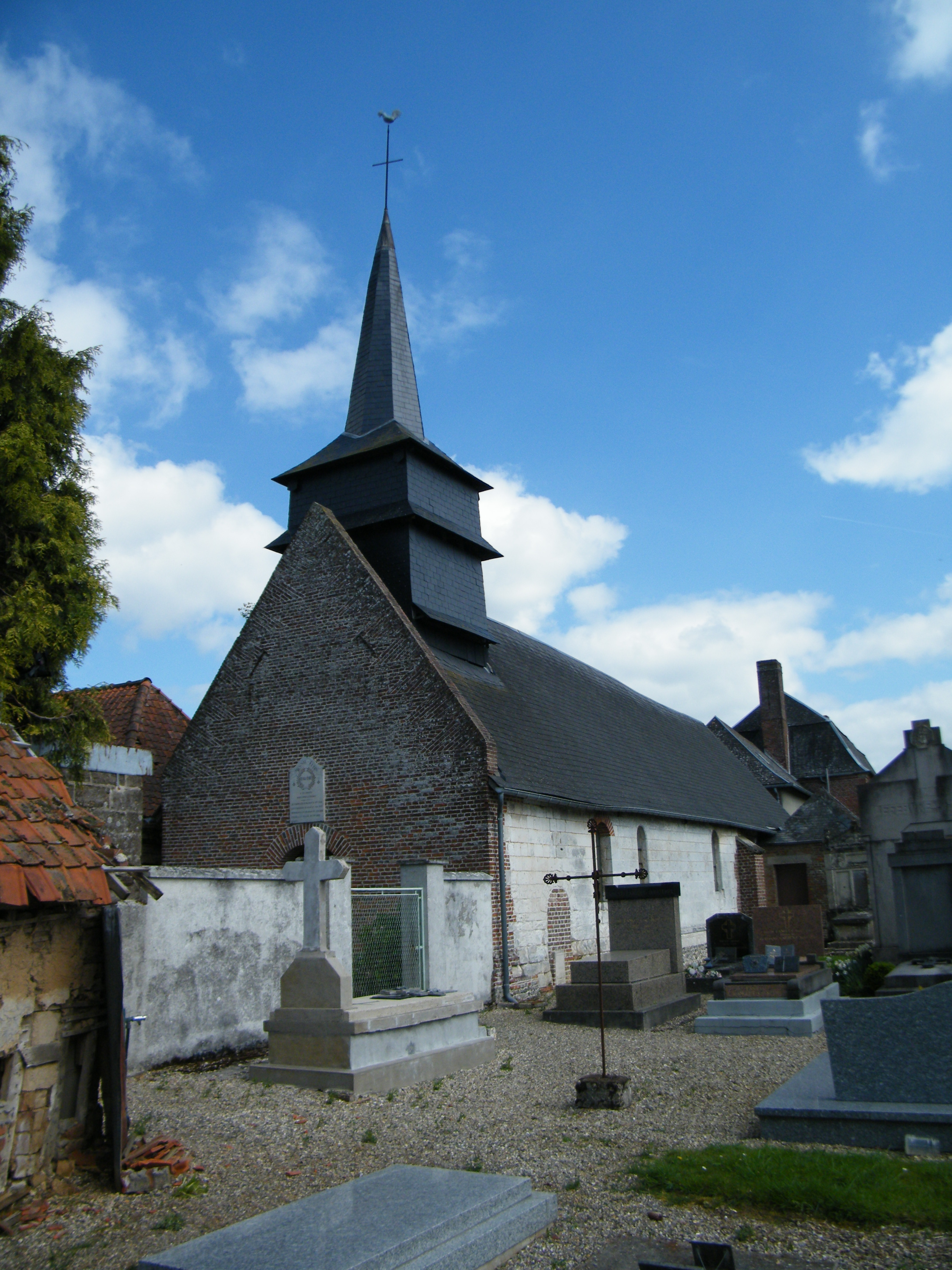 L'église de Mesnil-Heudin.